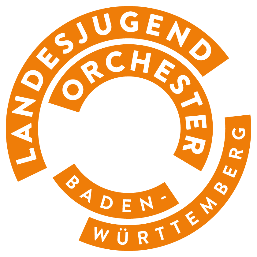 Logo des Landesjugendorchesters Baden-Württemberg